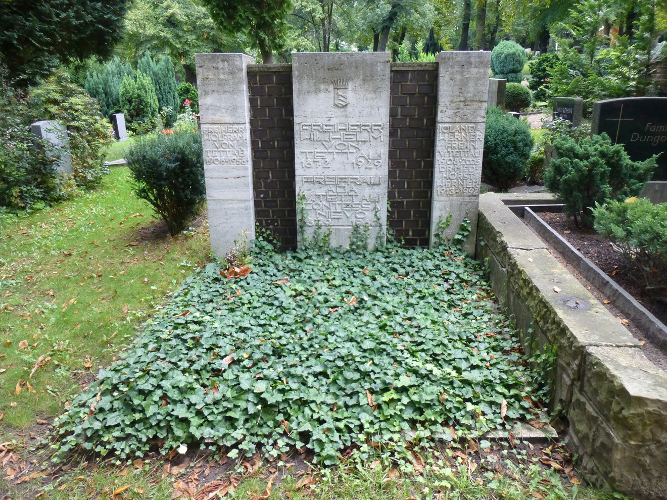 Grabstätte Wilhelm Freiher von Tettau auf dem Alten St.-Matthäus-Kirchhof Berlin.